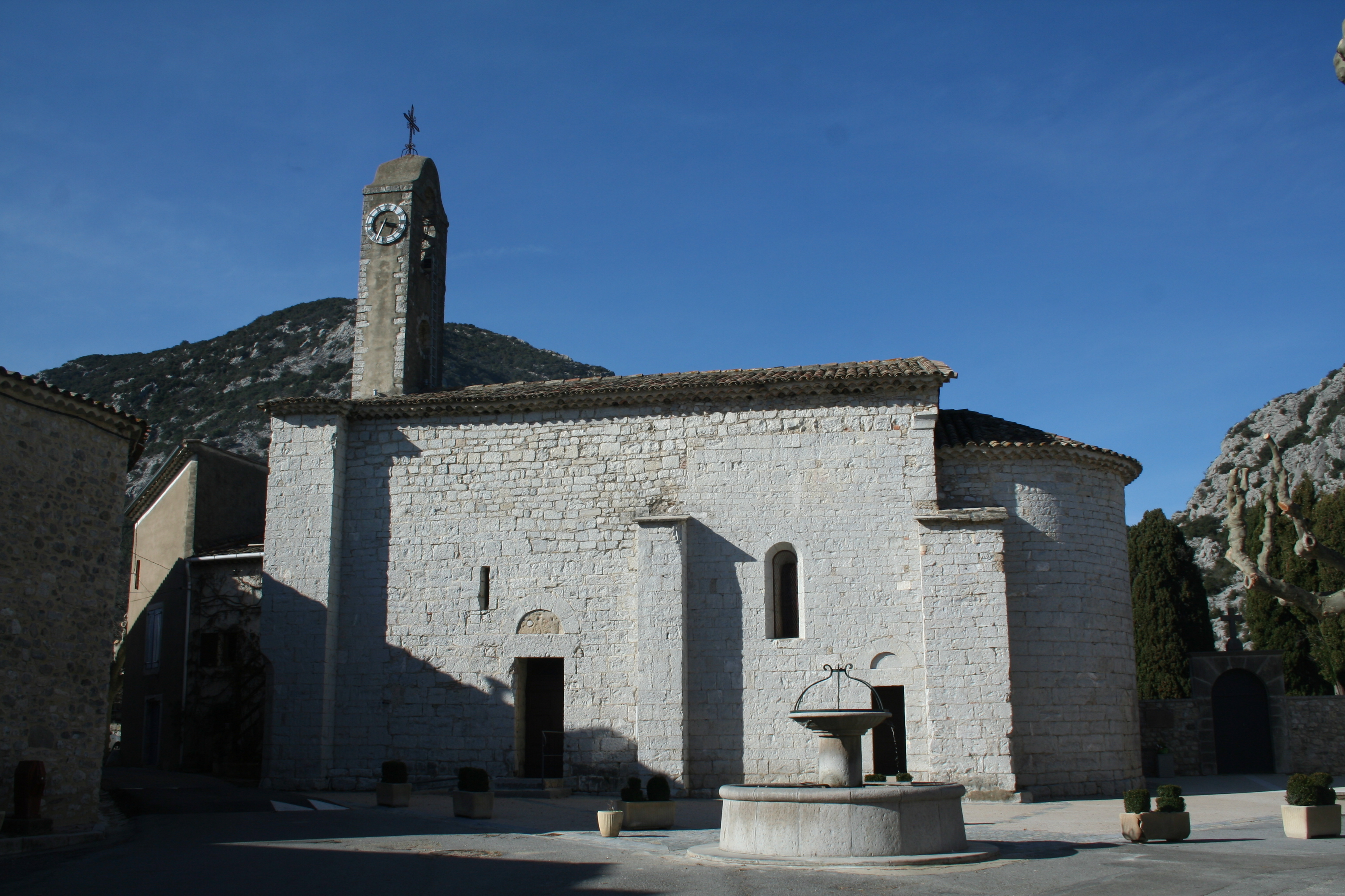 La Cadière-et-Cambo (Gard) - église Saint-Michel, façade sud